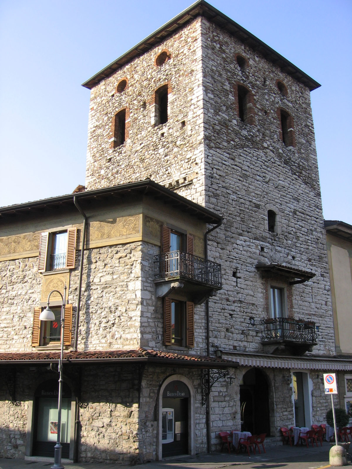 Trescore Balneario, Bergamo, Italia